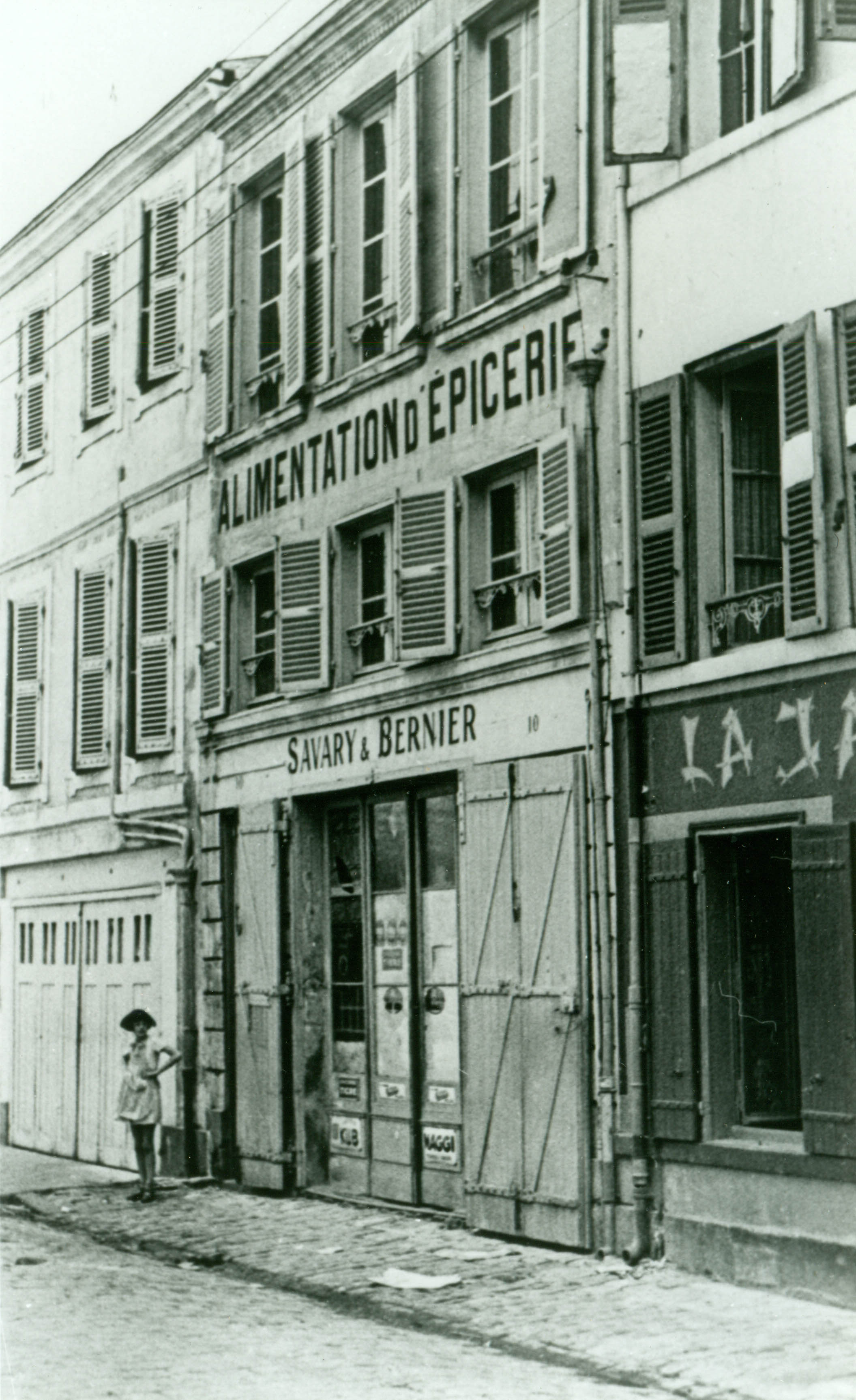 La rue des dames